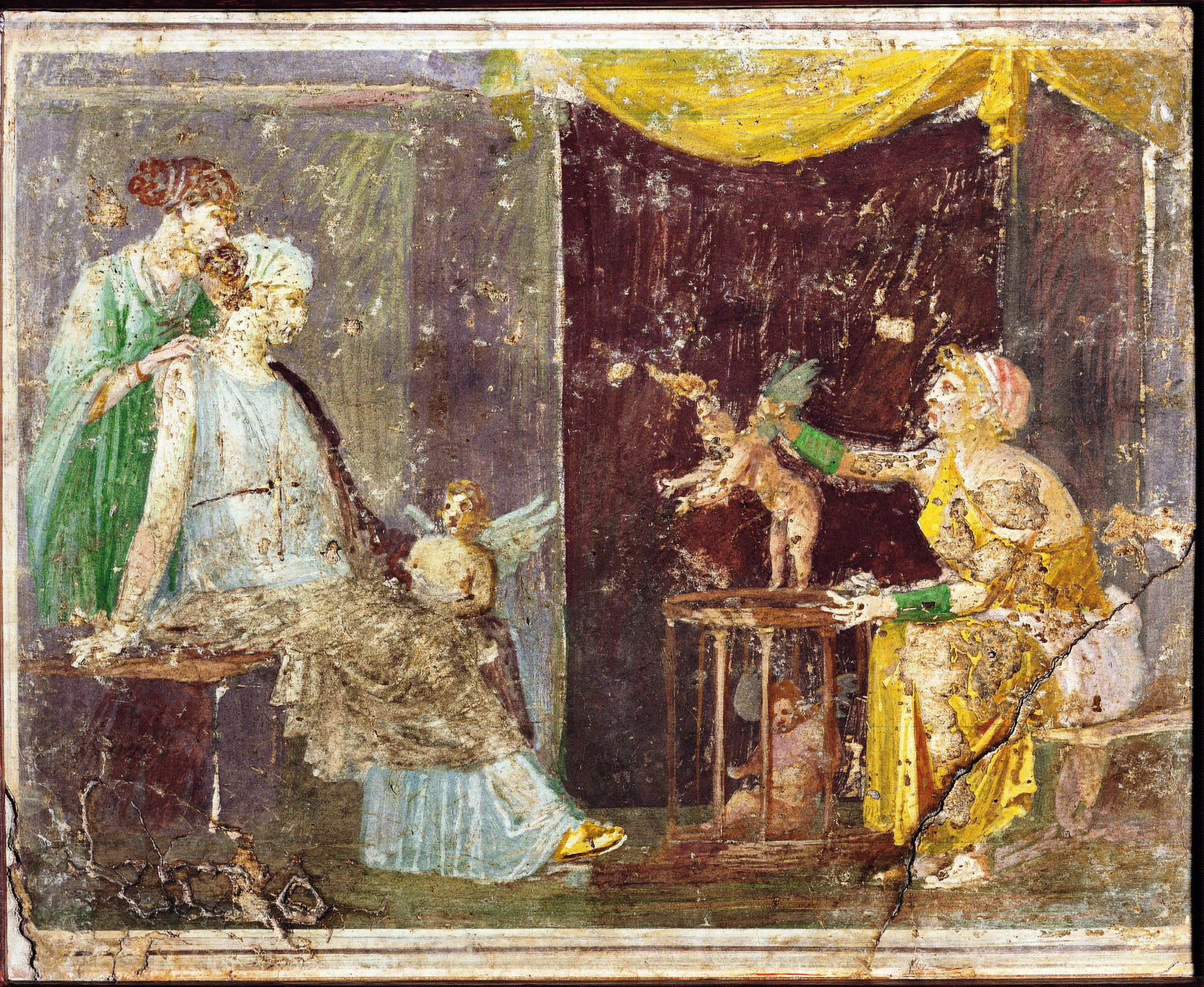 La Venditrice di amorini, affresco proveniente da Villa Arianna a Stabia, conservato al museo archeologico nazionale di Napoli